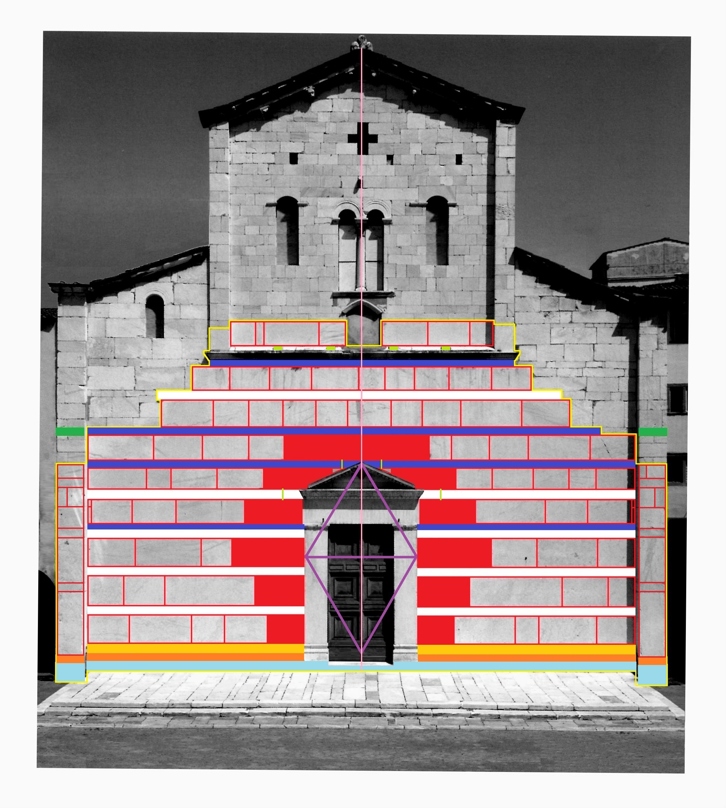 Sant'Alessandro Lucca, facciata. Lo schema evidenzia con diversi colori gli elementi compositivi delle parti conservate della facciata originaria della chiesa (contorno in giallo): podio, oggi interrato (celeste); fascia con funzione di plinto (arancio); base attica (giallo ocra); fasce di proiezione degli elementi strutturali (blu); fasce di partizione ritmica della superficie (bianco); posizione dei capitelli terminali degli originari più bassi risalti angolari (verde scuro); grandi lastre del paramento (contorno rosso); 12 lastre che si irradiano simmetricamente dal portale (campite interamente in rosso); doppio triangolo equilatero che regola le proporzioni del portale (viola); listelli decorativi attorno al frontone e basi delle colonnine del loggiato oggi mancante (verde chiaro); asse verticale centrale dell'intera composizione (rosa).